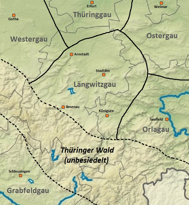 Ungefähre Lagekarte des Längwitzgaus in Thüringen.